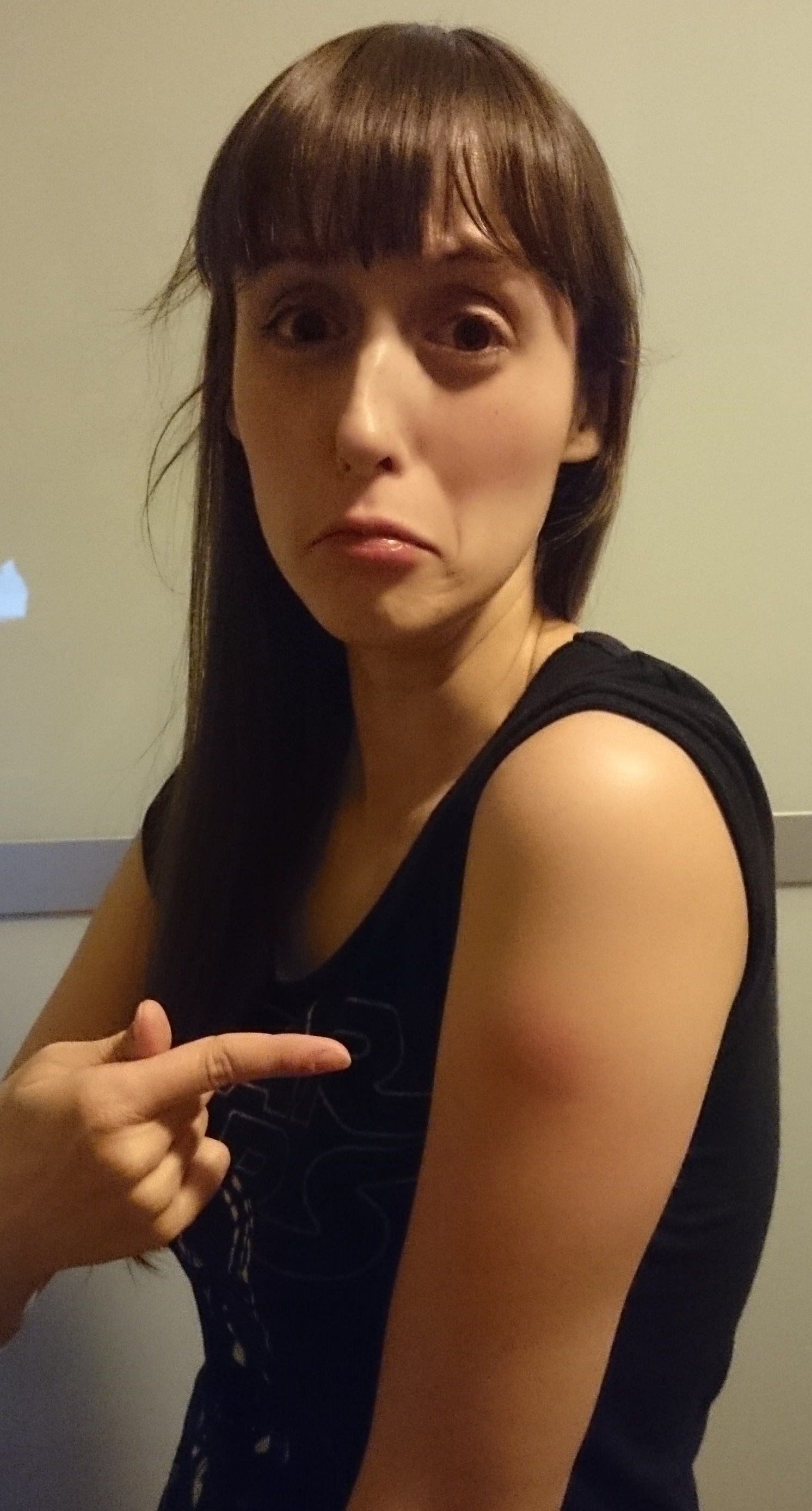 Hier sieht man den Wundebereich der Einstichstelle der Tetanus-Kombinations-Impfung REPEVAX (Ch.-B.: M0080-4) einen Tag nach der Verabreichung. Patient hat Schmerzen.